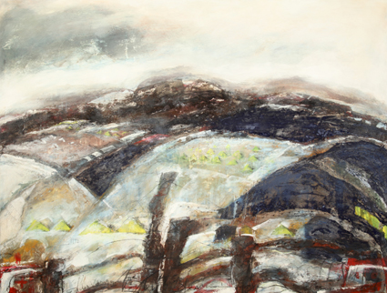 Malerei mit dem Titel "Feld des Wohlbehagens" des Künstlers Lutz Bernsau